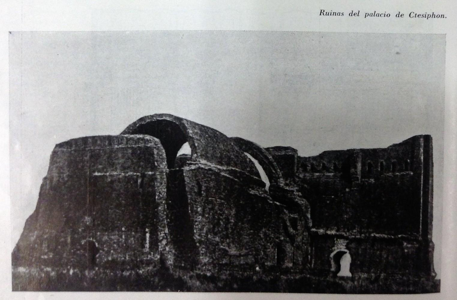 Ruínas de la iglesia Ctesifonte